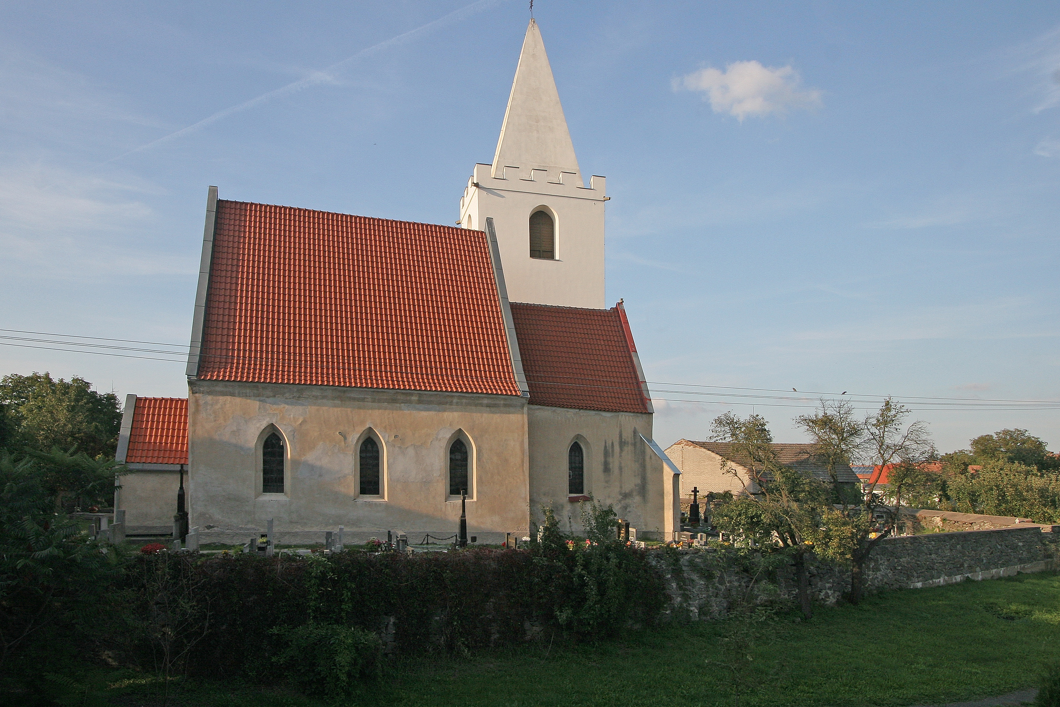 Kostel sv. Václava (Staré Ždánice), Staré Ždánice